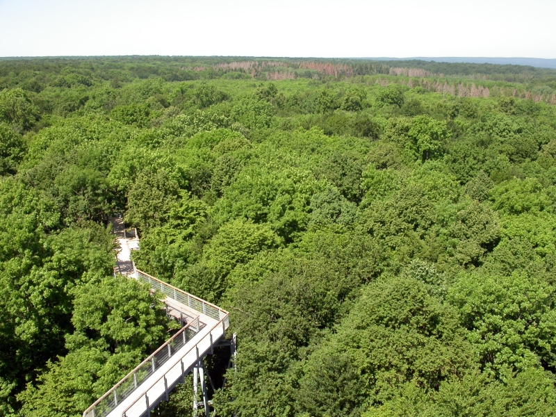 Nationalpark Hainich, Thüringen, Baumwipfelpfad, Germany